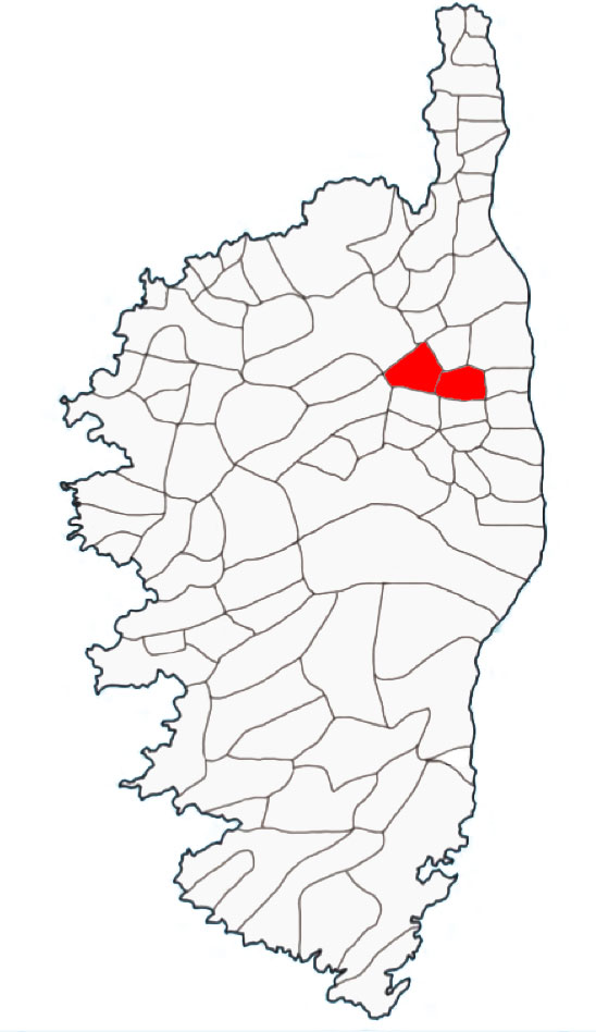 Corsu: E pieve di u vescuvatu d'Accia, Corsica